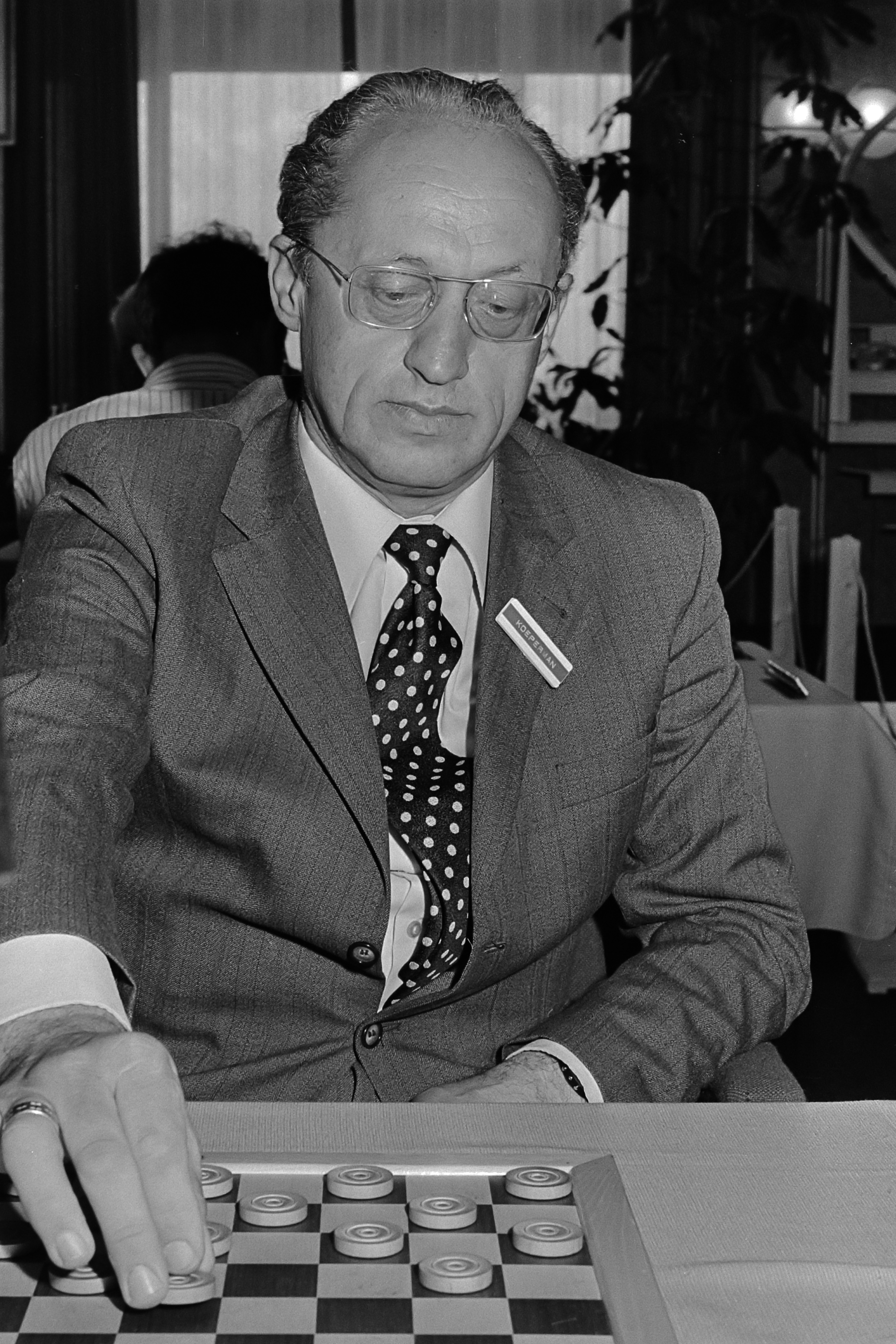 Wereldkampioenschappen Dammen in Amsterdam, Iser Koeperman 5 augustus 1976